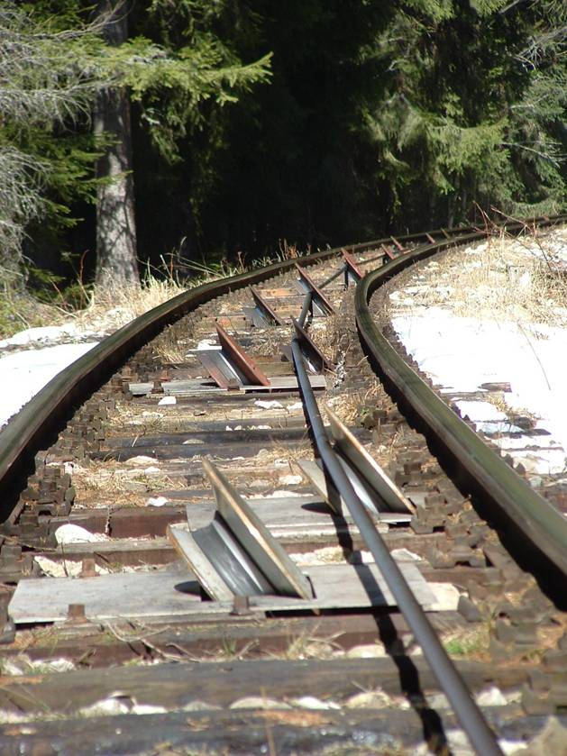 Sikló pályája ívben (Tátra)